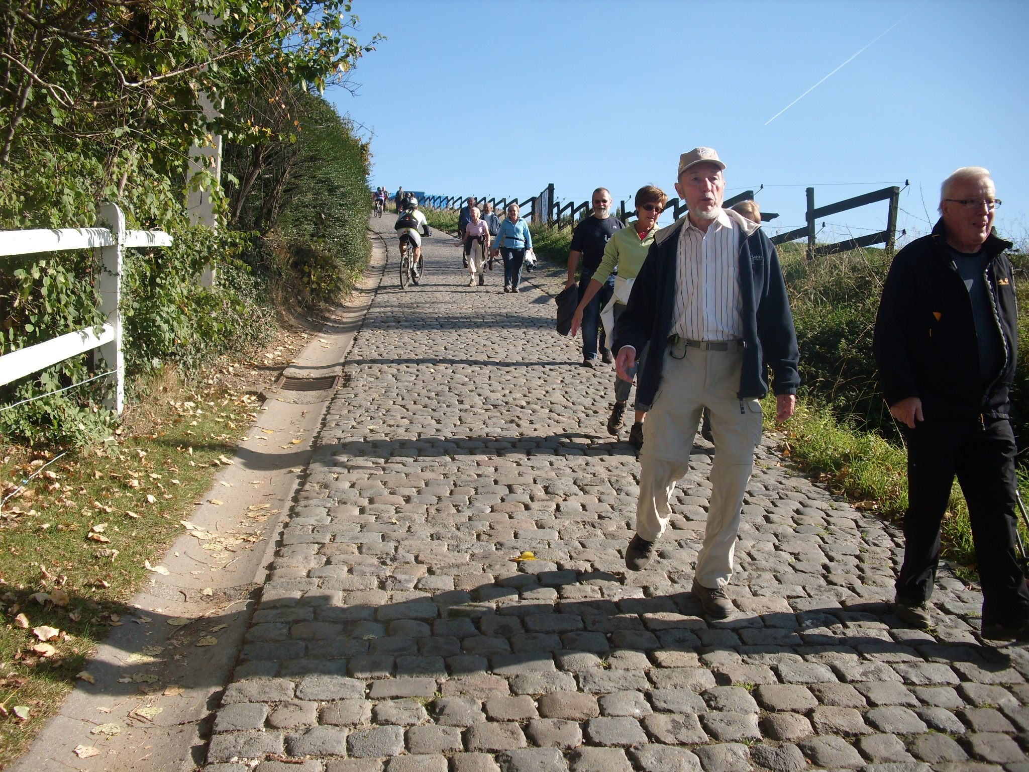 Wandelaars op de Paterberg - Kluisbergen - België